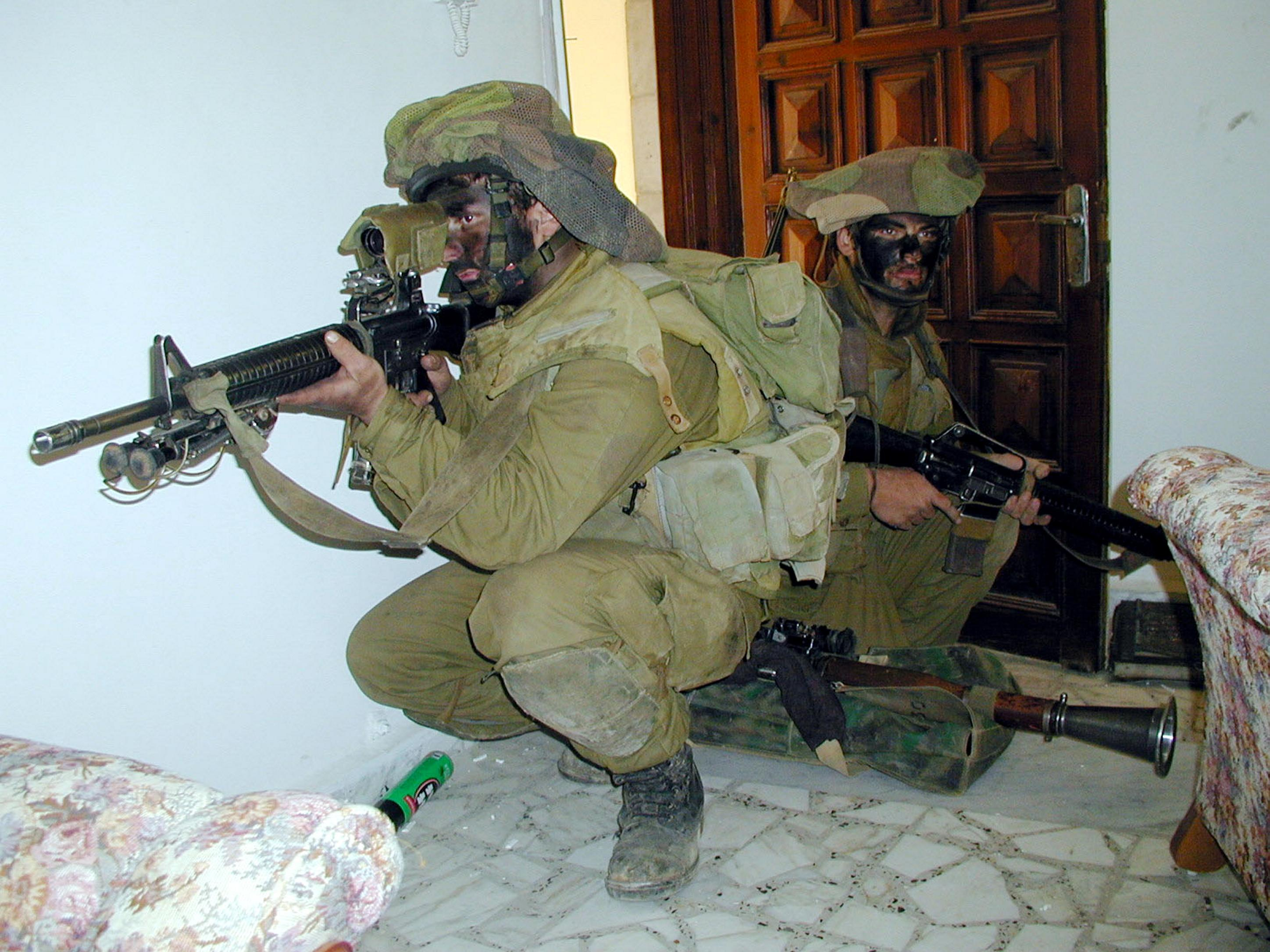 מבצע "חומת מגן" להריסת תשתיות הטרור ברשות הפלשתינית על ידי כוחות צה"ל בג'נין. בצילום, פעילות מבצעית של חיילי צה"ל בג'נין.